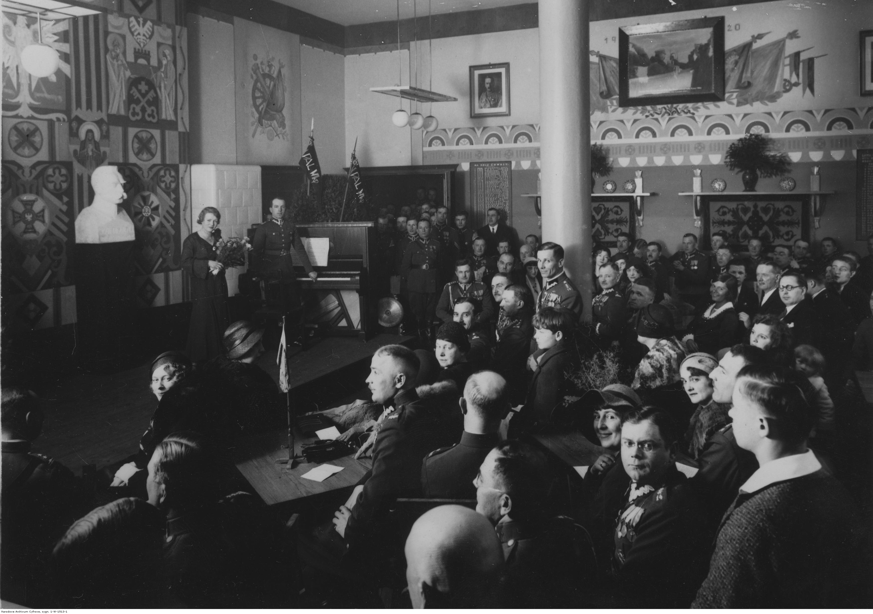 Poświęcenie świetlicy im. Marszałka Józefa Piłsudskiego w koszarach 14 Pułku Artylerii Lekkiej Wielkopolskiej z Poznania 19 marca 1932 r. Uczestnicy uroczystości. Widoczni m.in. gen. Kazimierz Dzierżanowski (za kolumną), szef sztabu DOK VII płk Janusz Dżugay (siedzi przy estradzie, w pierwszym rzędzie zwrócony twarzą w kierunku sali), płk Franciszek Wład (siedzi pod kolumną), płk Franciszek Alter (za Dżugay'em), płk Michał Gałązka (siedzi przy końcu estrady) oraz por. Sujkowski, akompaniator pani Jasnochowej, która odśpiewała kilka pieśni. Koncern Ilustrowany Kurier Codzienny - Archiwum Ilustracji. Sygnatura: 1-W-1513-1